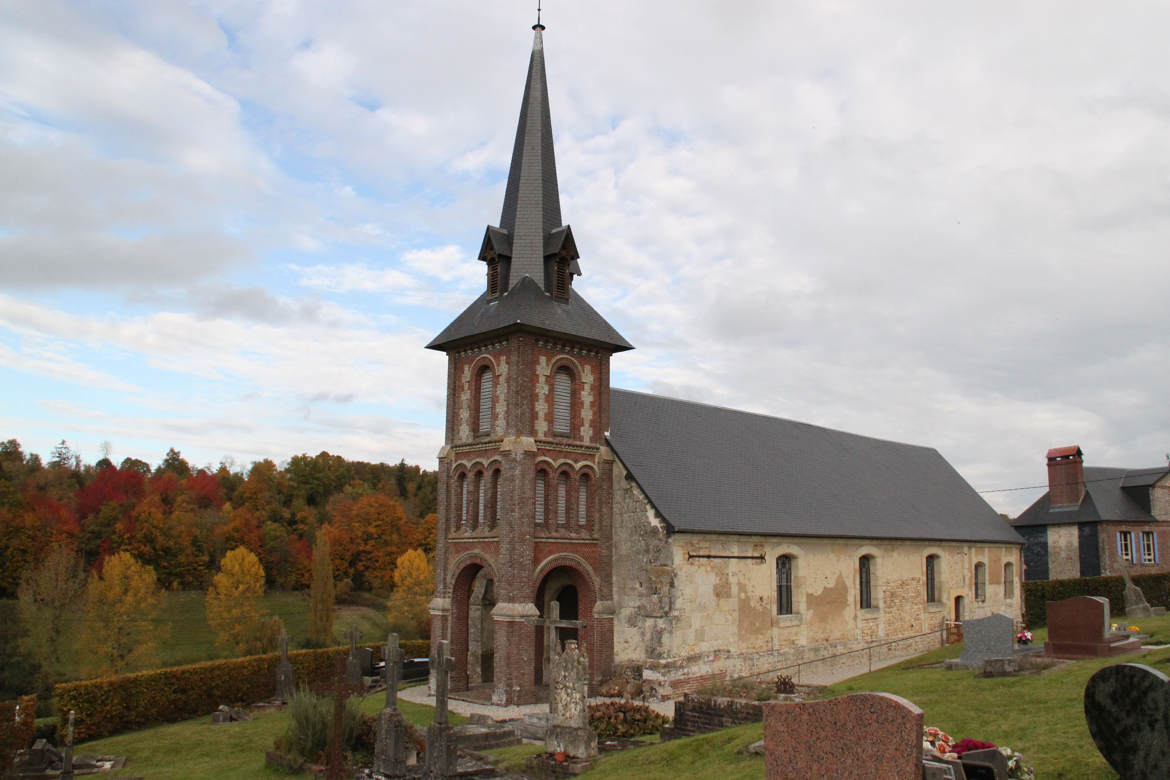 l'église du Mesnil-Germain, Calvados, France.